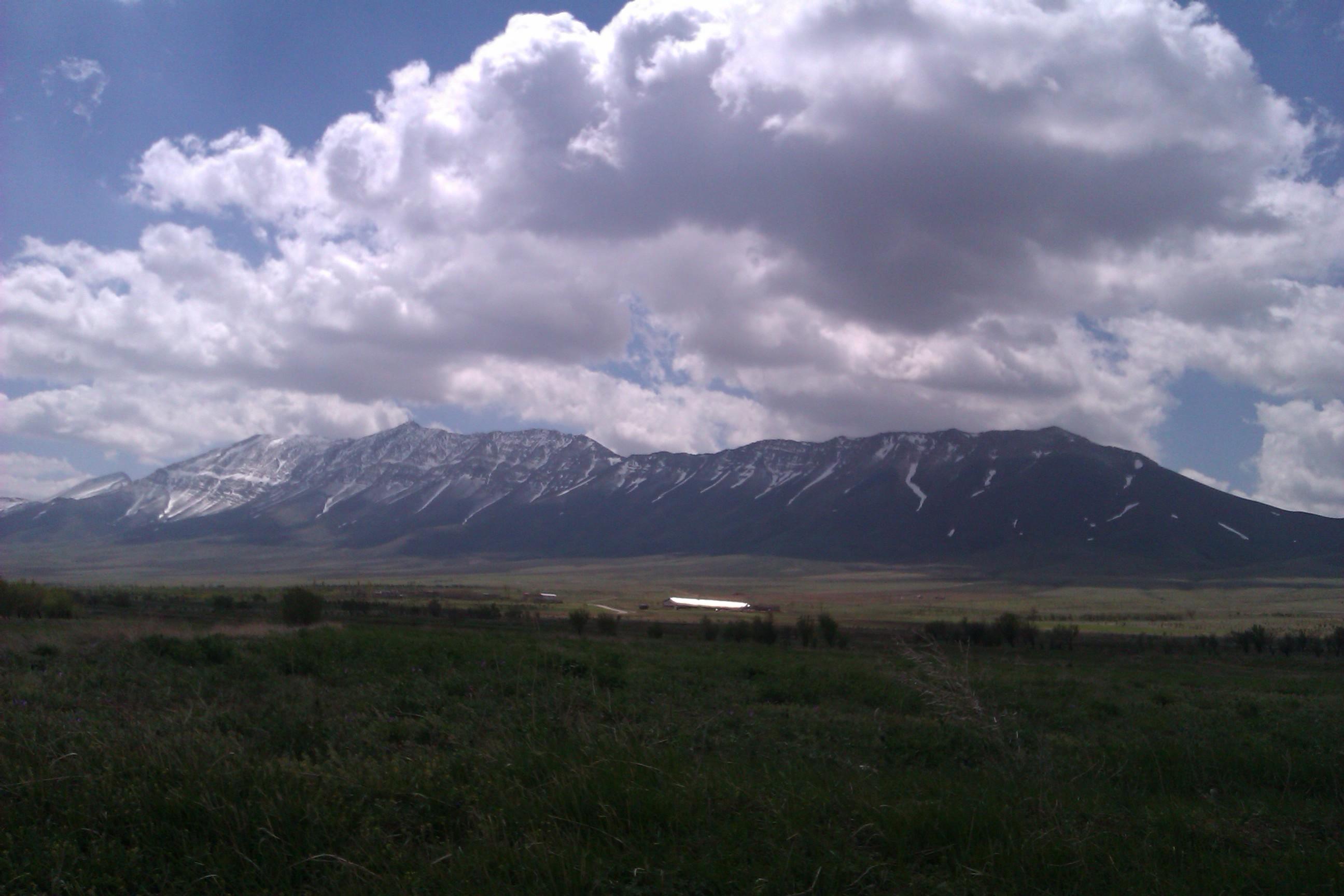 رشته کوههای کمر بسته روستای فرج آباد